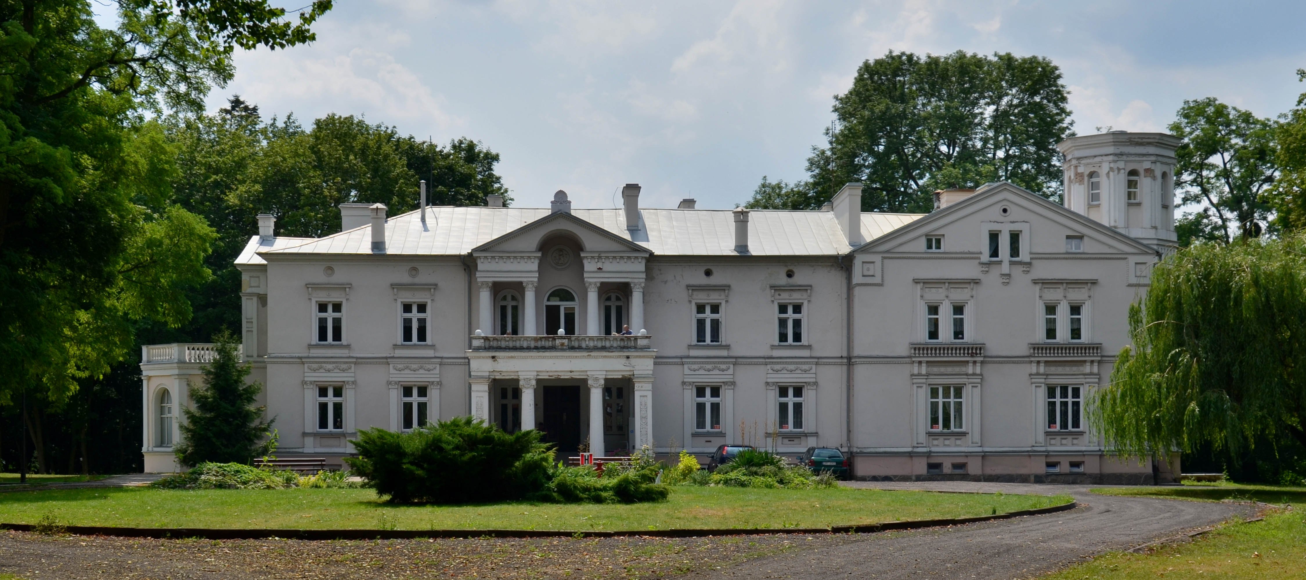 Ugoszcz, pałac, 1875, 1904